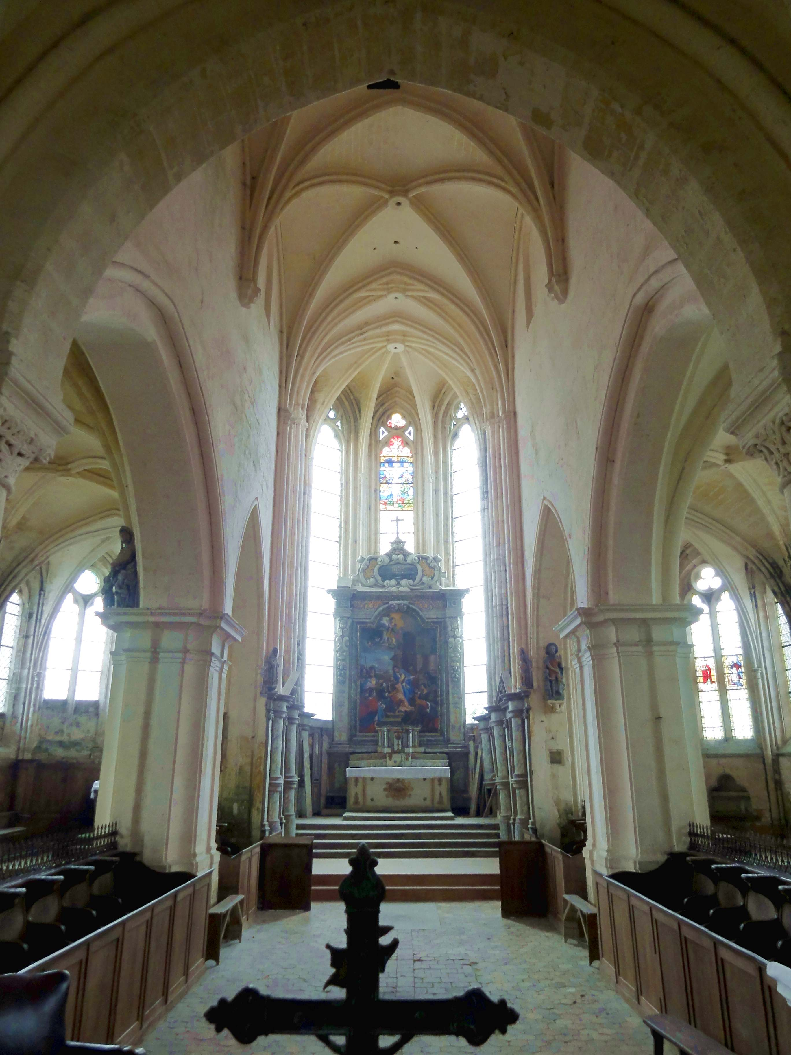 Intérieur de l'église (voir titre).